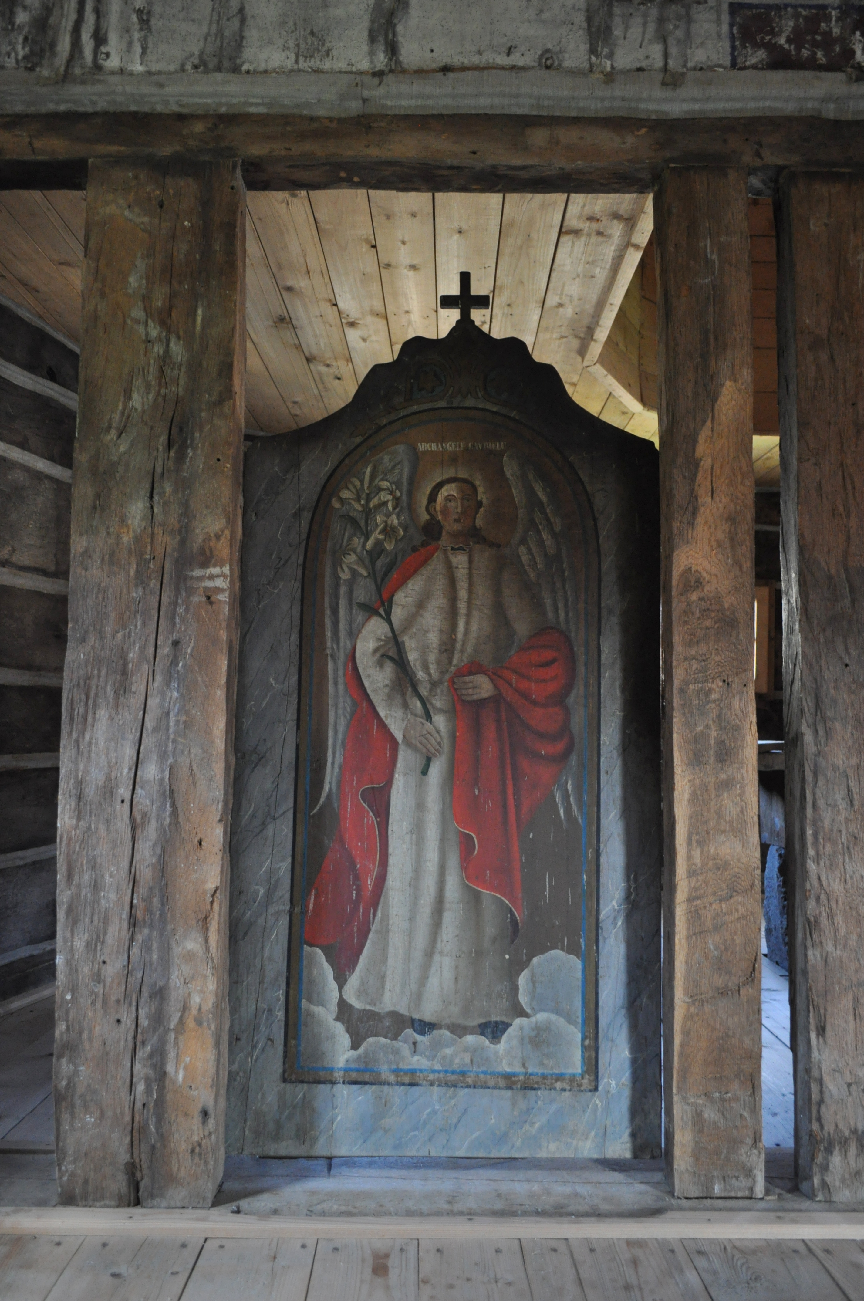 Biserica de lemn "Întâmpinarea Domnului", sat GROŞII NOI; comuna BÂRZAVA